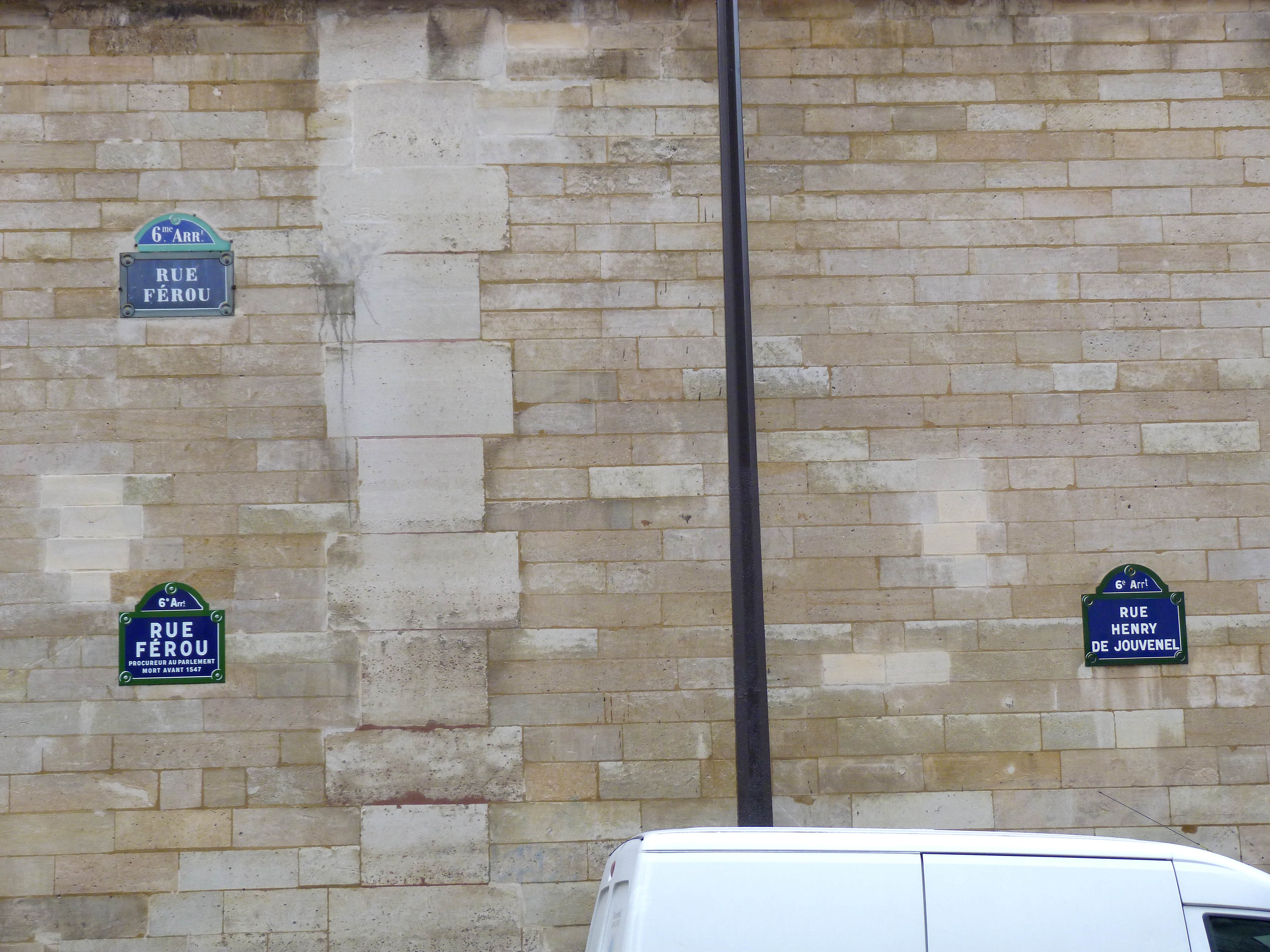 Jonction de la rue Férou avec la rue Henry de Jouvenel qui l'a tronçonnée en 1936 (Paris 6e arrond), non loin de la place Saint-Sulpice. Plaques apposée sur le mur de l'Hôtel des finances.